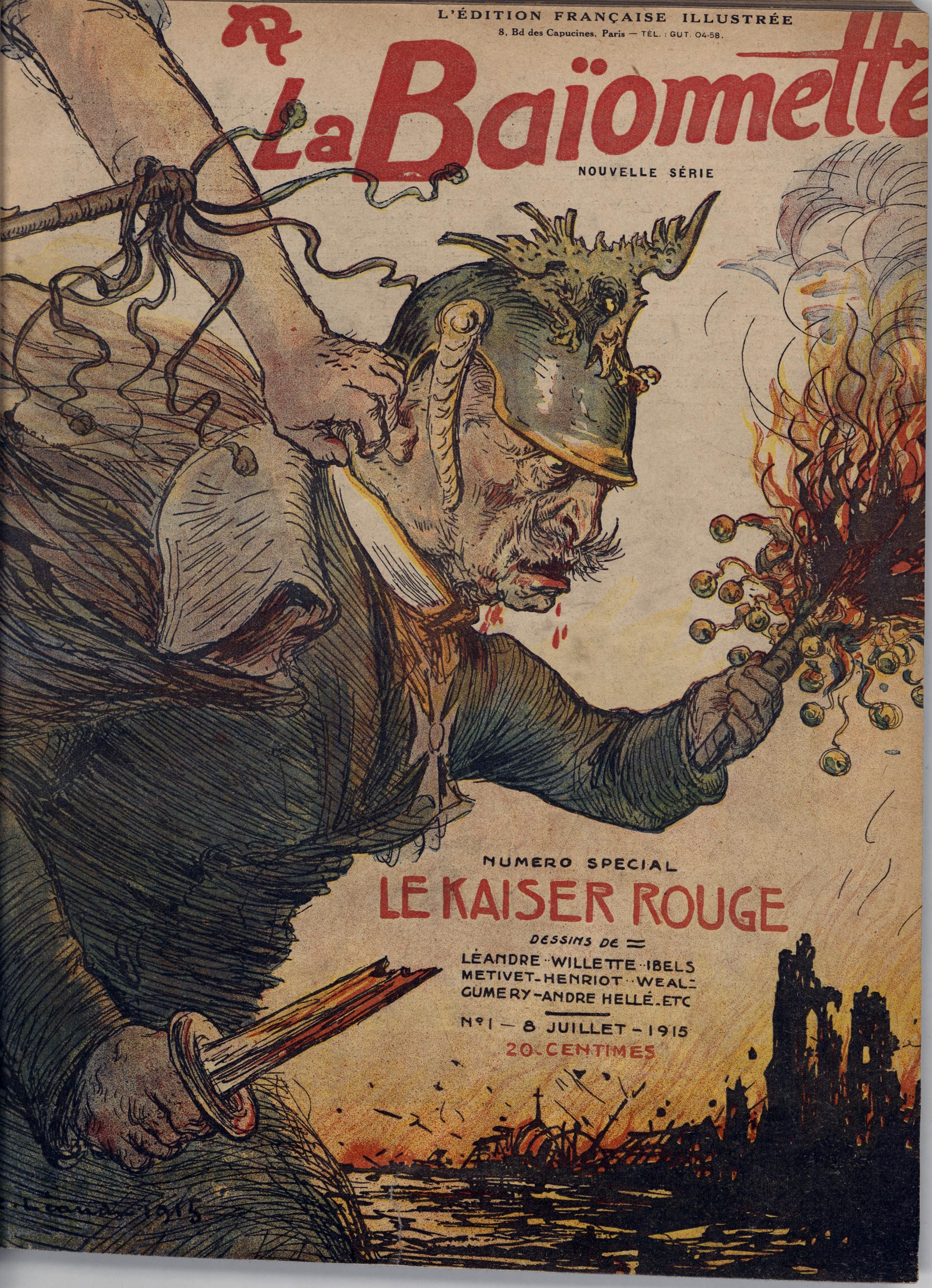 Cover.